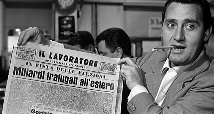 Screenshot del film Una vita difficile (1961) di Dino Risi.